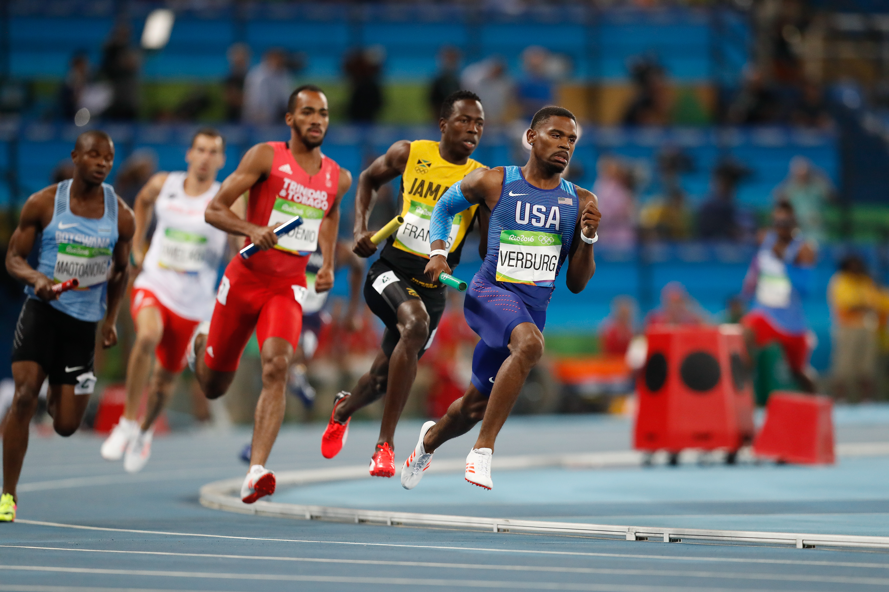 Rio de Janeiro - Eliminatórias do revezamento 4 x 400m nos Jogos Rio 2016, no Estádio Olímpico (Fernando Frazão/Agência Brasil)